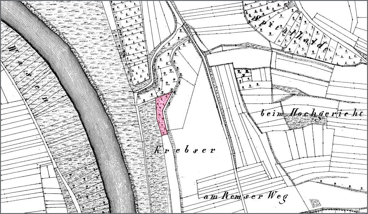 Württembergische Flurkarte NO XXXVI 15 von 1832 (Ausschnitt mit nachtr. Einfärbung)